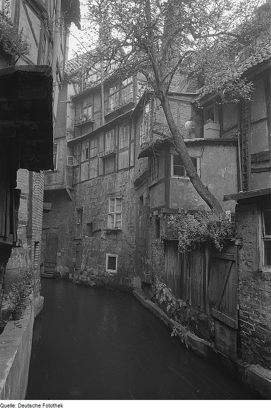 Original image description from the Deutsche Fotothek Quedlinburg. Fachwerkhäuser an einem Bach